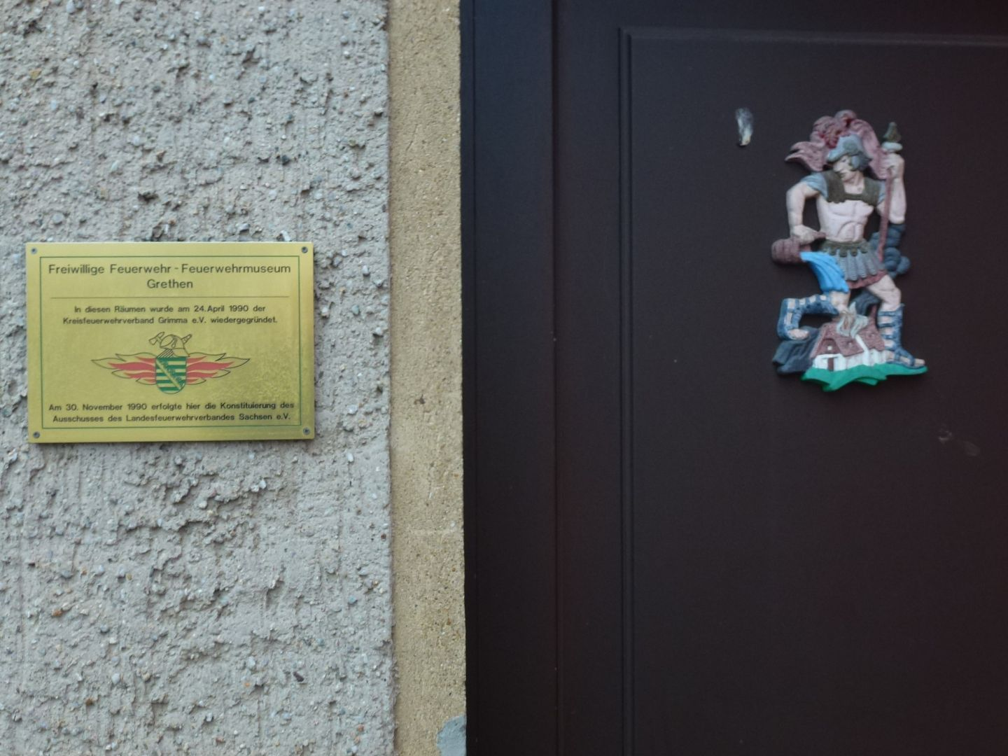 Feuerwehrmuseum in Grethen